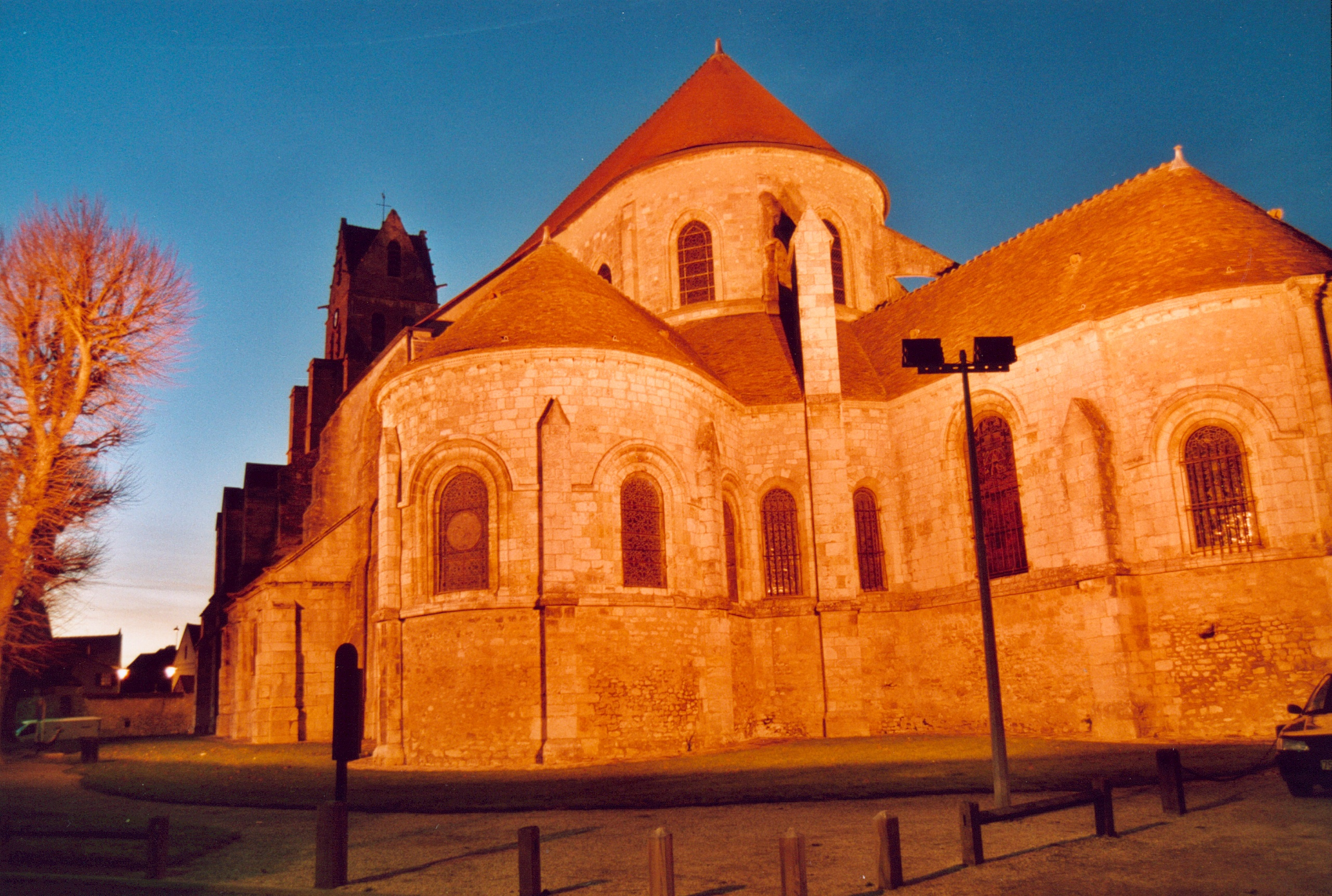 France Essonne Etampes Eglise Saint-Martin Photographie prise par GIRAUD Patrick